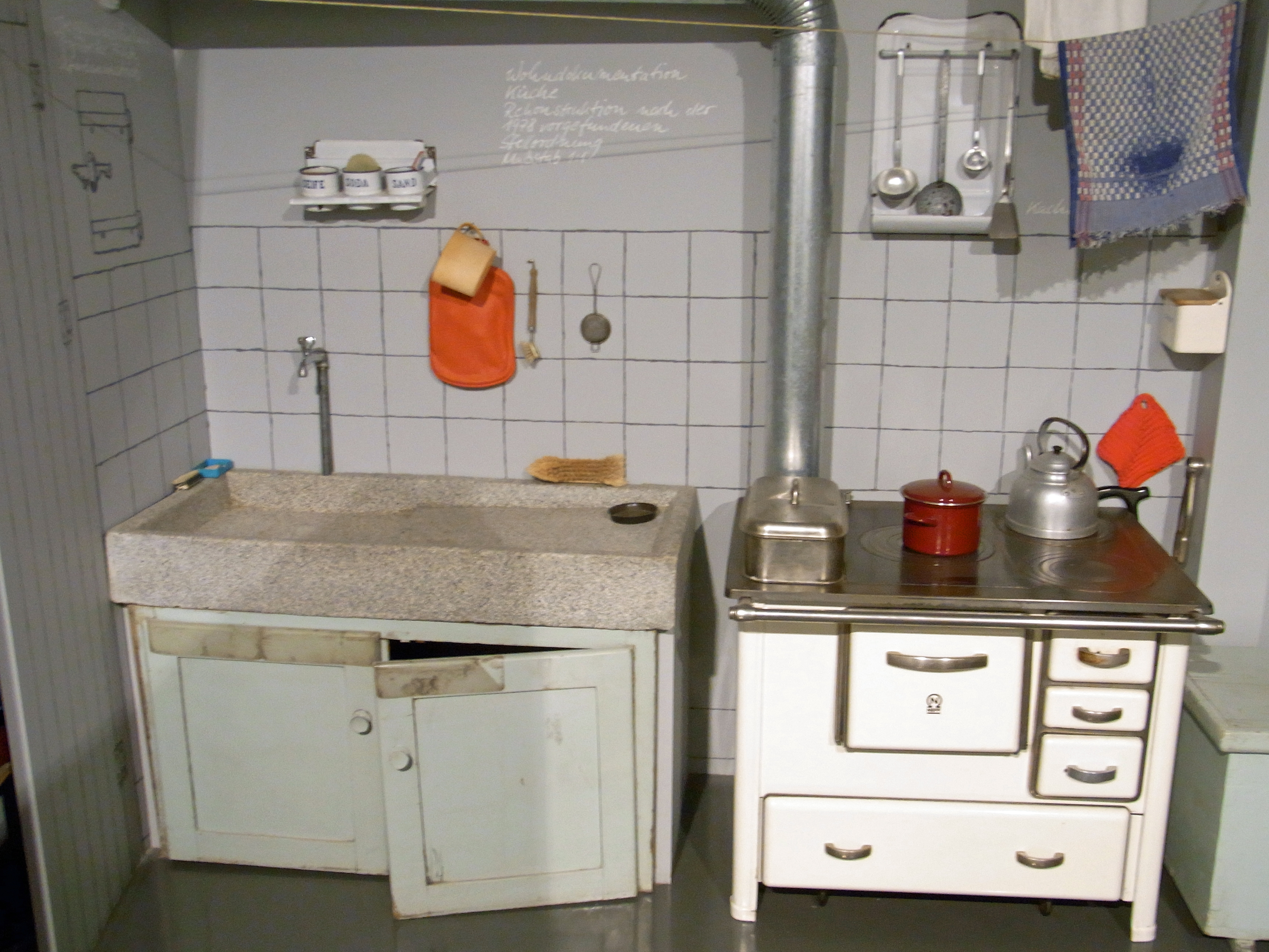 Landesmuseum Württemberg (Außenstelle Museum für Volkskultur in Württemberg, Waldenbuch) Küche Terazzospülstein, 1928; Herd um 1930/40; Wandfließen, 1928